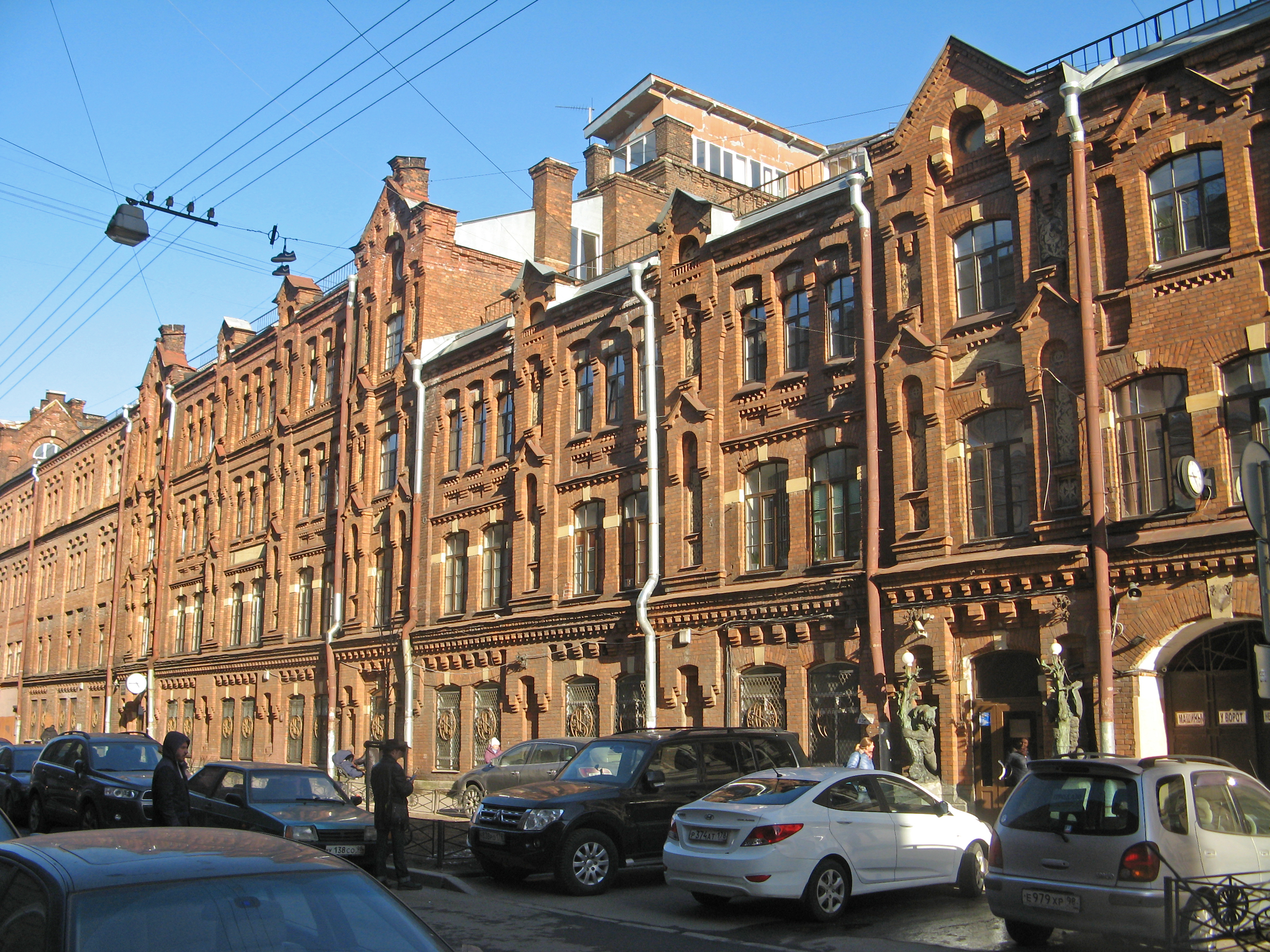 Здание фабрики: улица Достоевского, 40-44, Центральный район, Санкт-Петербург